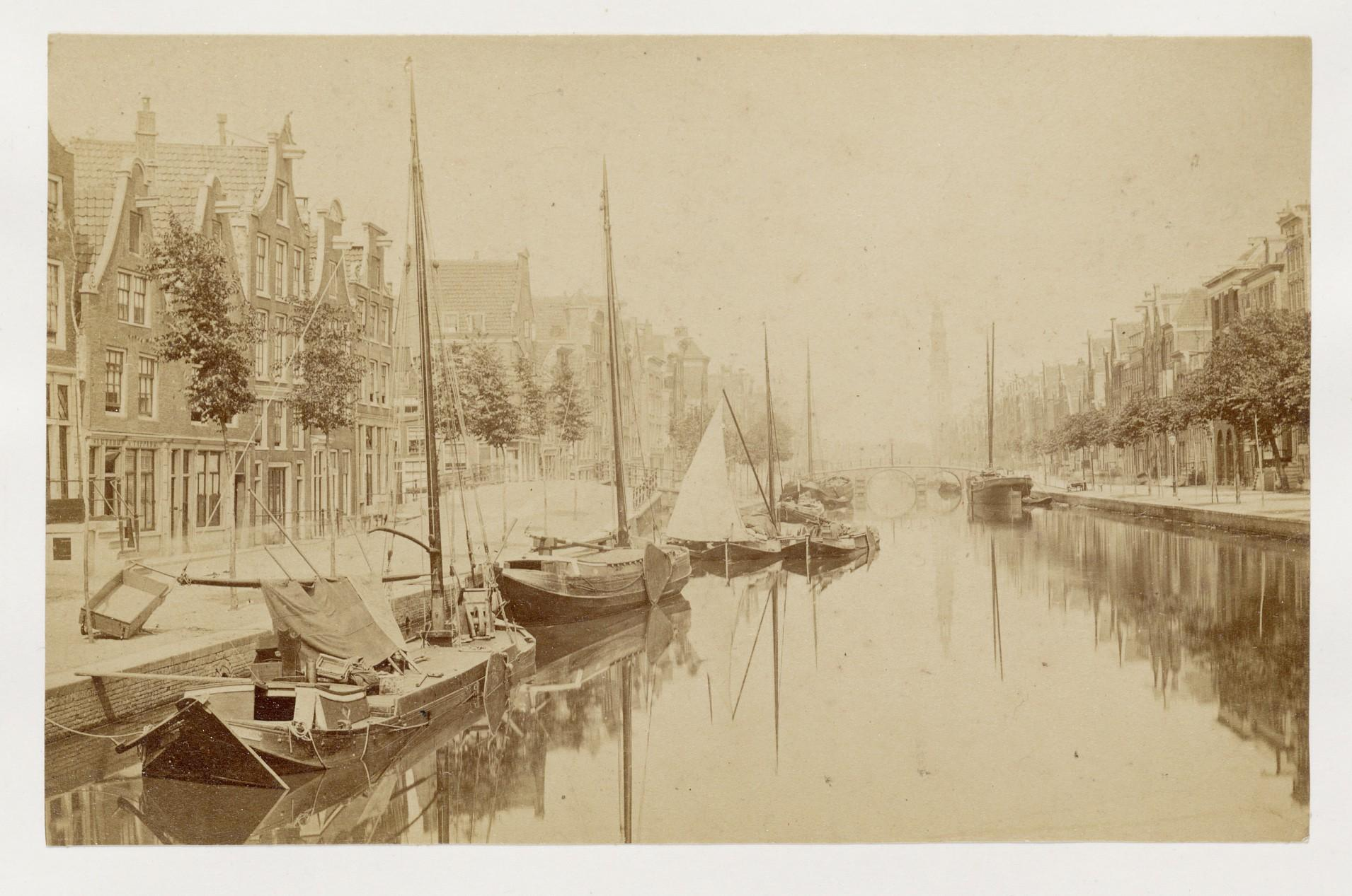 Beschrijving Prinsengracht 392 en lager Links de ingang van de Passeerdersgracht met brug 96. Gezien naar het noorden, met links brug 66 voor de Looiersgracht. In het verschiet de Westertoren. Documenttype foto Vervaardiger Oosterhuis, Pieter Collectie Collectie Stadsarchief Amsterdam: foto-afdrukken Geografische naam Passeerdersgracht Prinsengracht Inventarissen Afbeeldingsbestand OSIM00001004419 Generated with Dememorixer